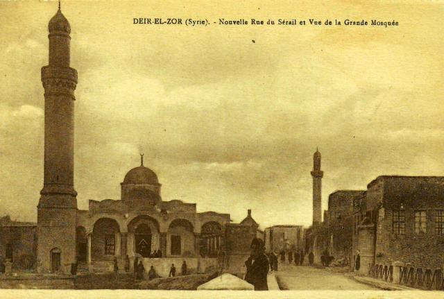 بطاقة بريدية قديمة تعود إلى إلى عشرينيات القرن الماضي، وفيه جامع دير الزور الكبير، وأمامه الطريق الحديث آنذاك والذي تم إنشاؤه في عهد الانتداب الفرنسي على سورية، وبالقرب من هذا الطريق يقع الجسر المعلق.